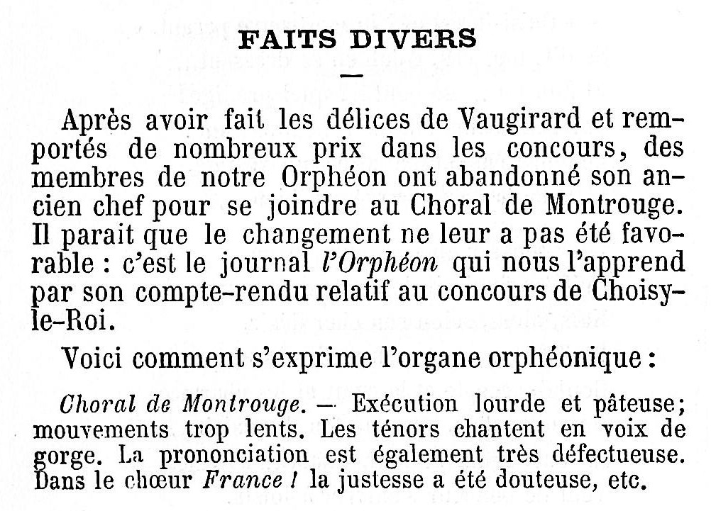 Critique de membres d'un Orphéon dans une publication de goguettiers.